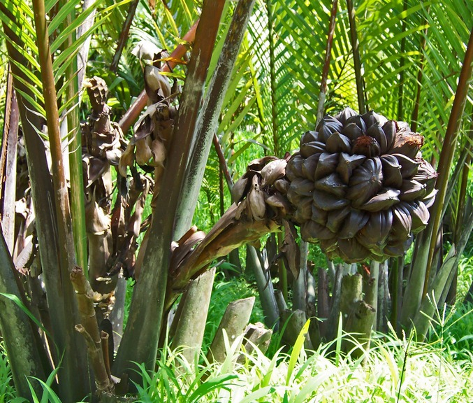 Nypa fruticans fruit. Bogor Botanical Garden, West Java, Indonesia